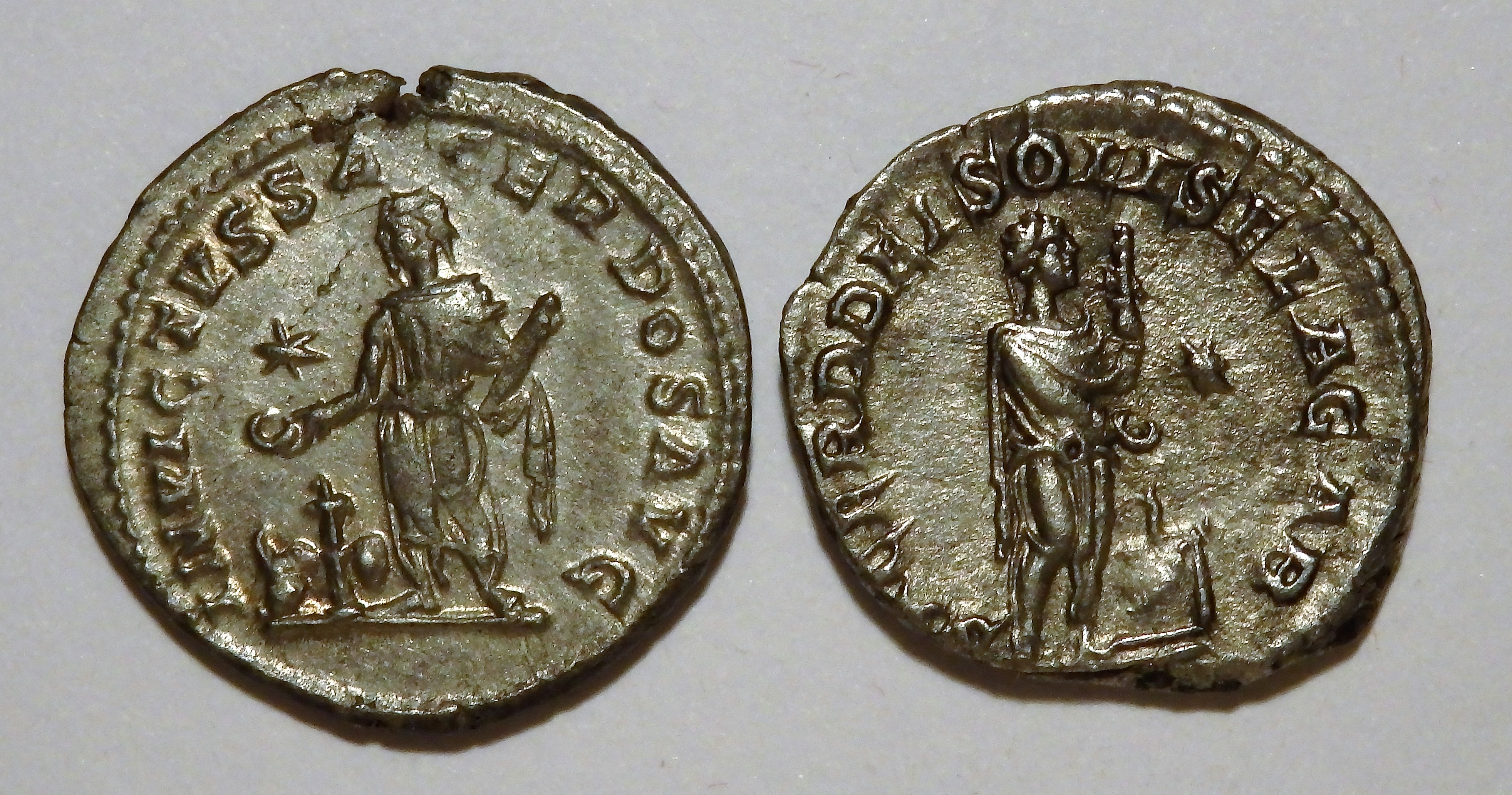 religiöse Motive auf Denaren des Elagabal, Kampmann 56.29 und 56.48